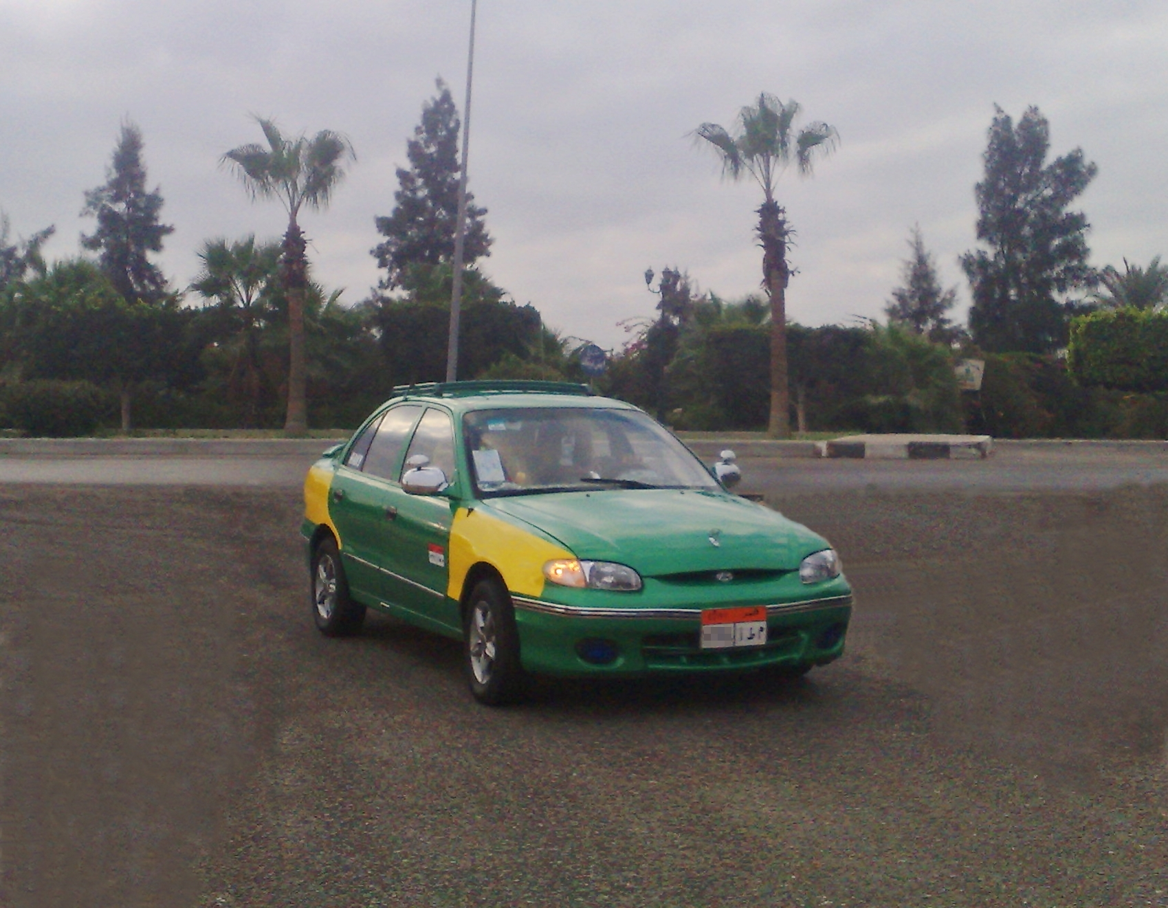 سيارة أجرة بمدينة السادات - مصر.